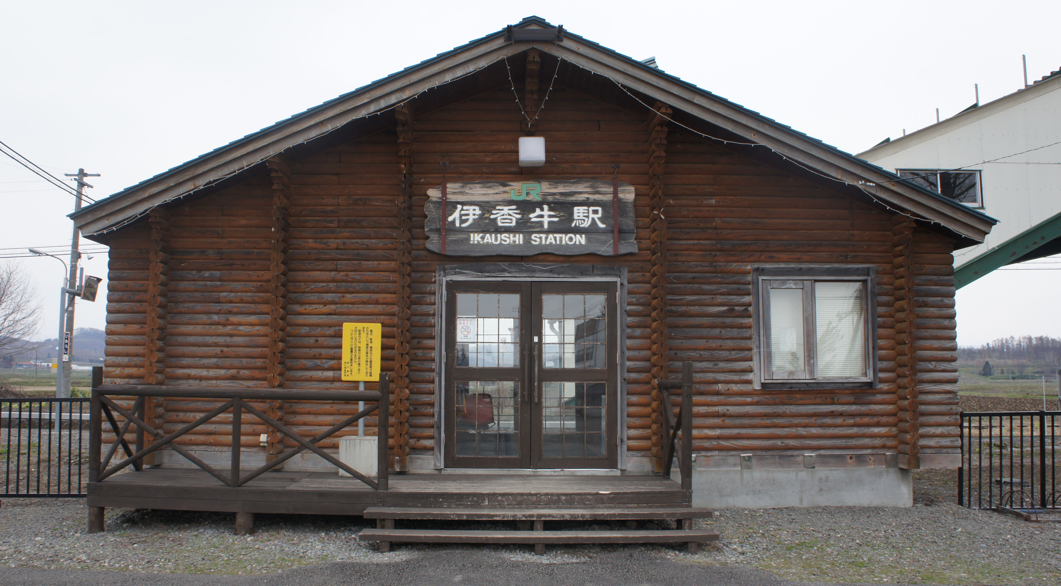 JR石北本線・伊香牛駅の駅舎